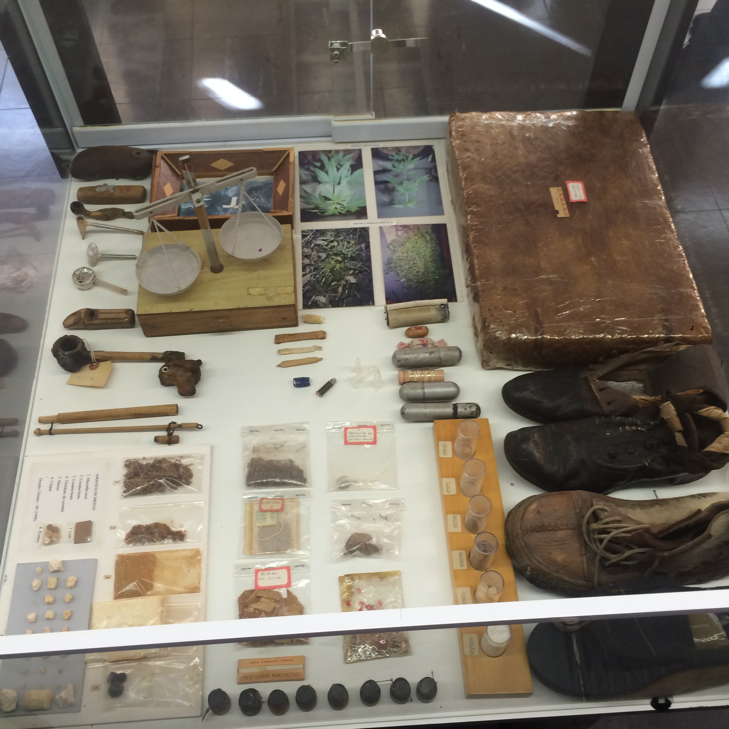 Acervo do Museu da Polícia Civil do Estado de São Paulo.